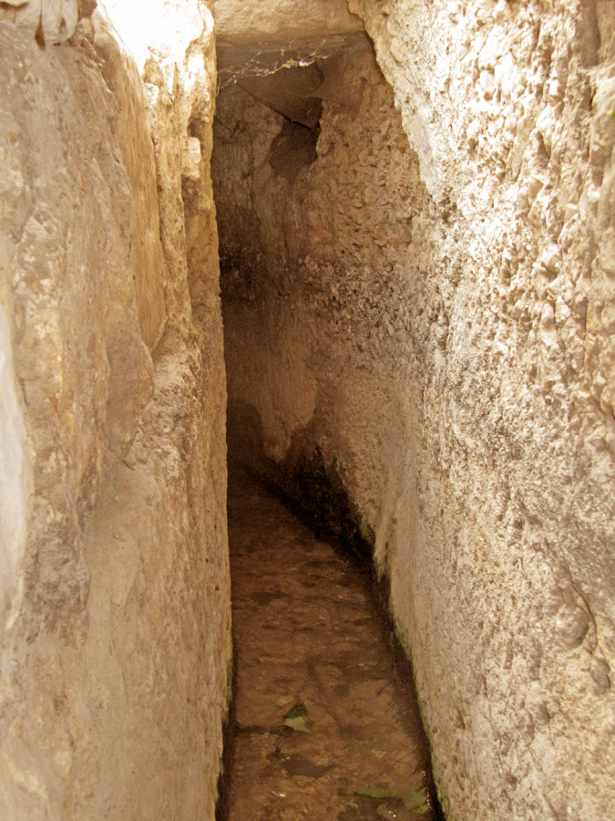 Hezekiah's Tunnel נקבת השילוח